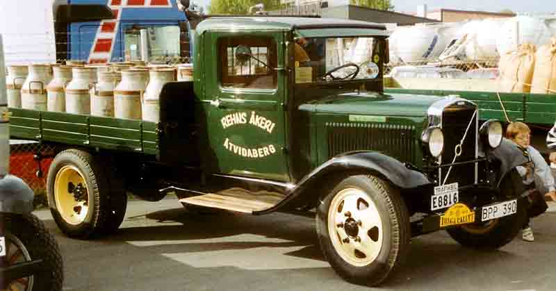 Volvo LV71D Truck 1934